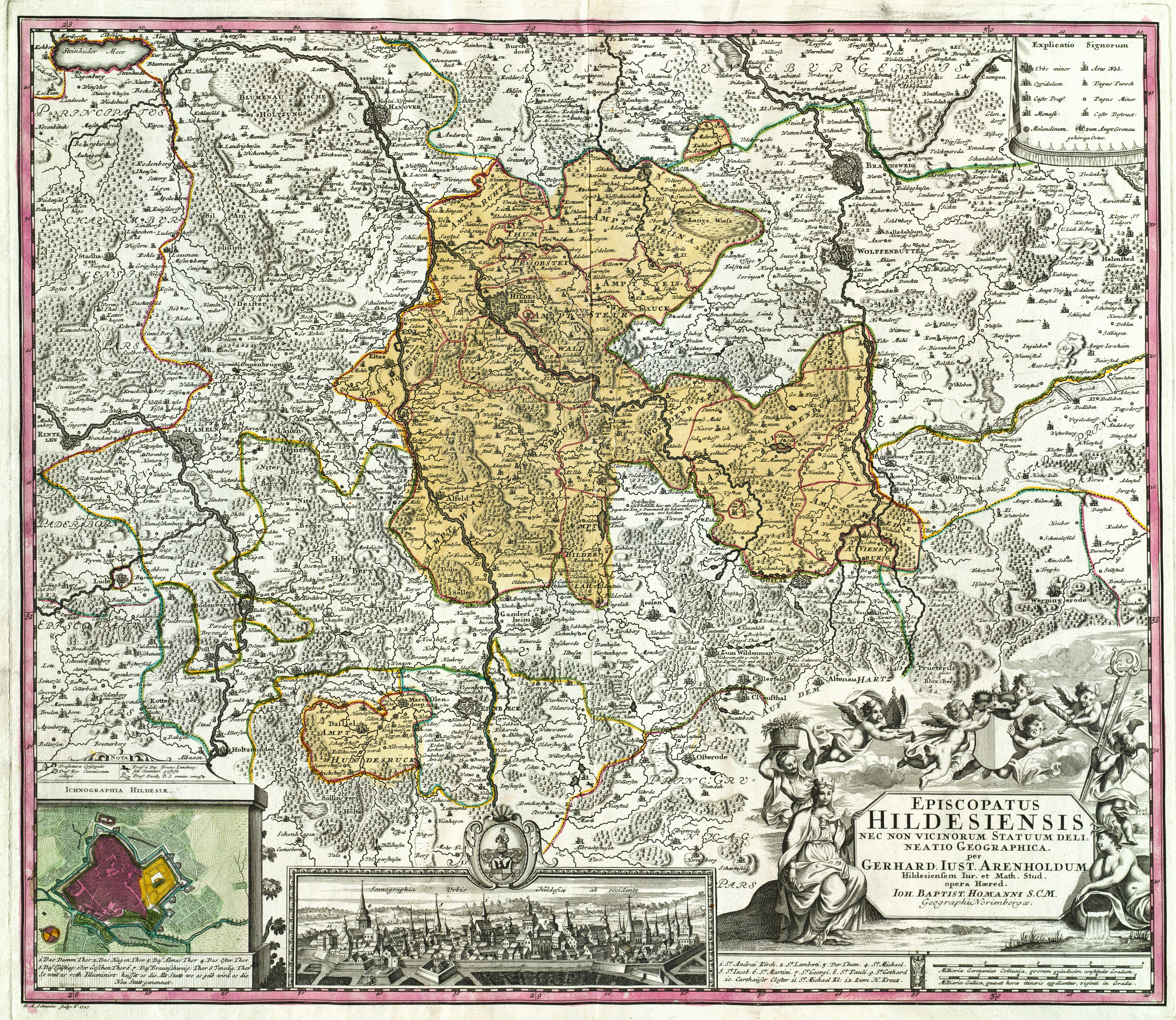 „Episcopatus Hildesiensis nec non Vicinorum Statuum delineatio geographica ...“